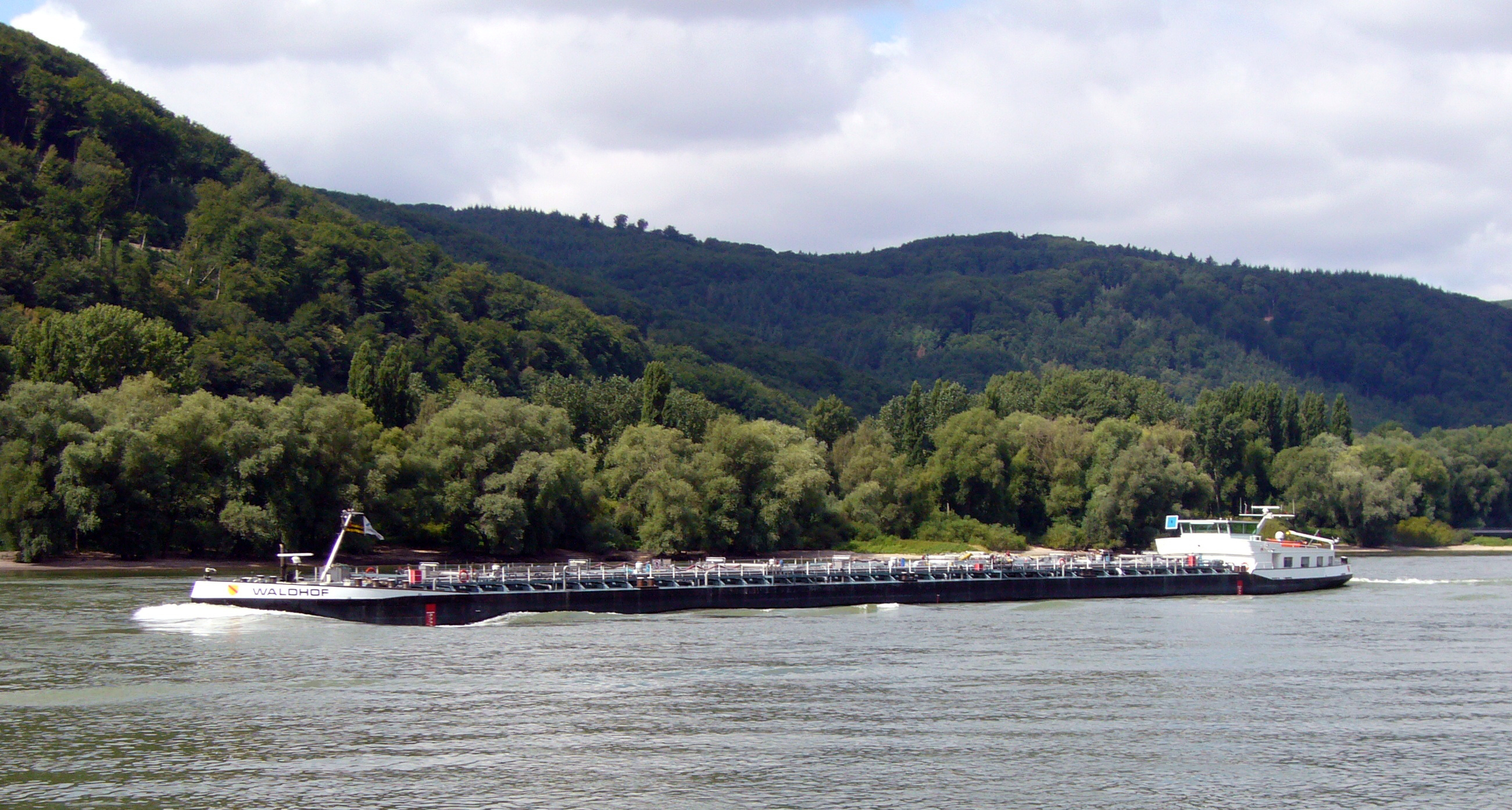 Tankschiff Waldhof im August 2008 (vermutlich irgendwo auf dem Rhein)